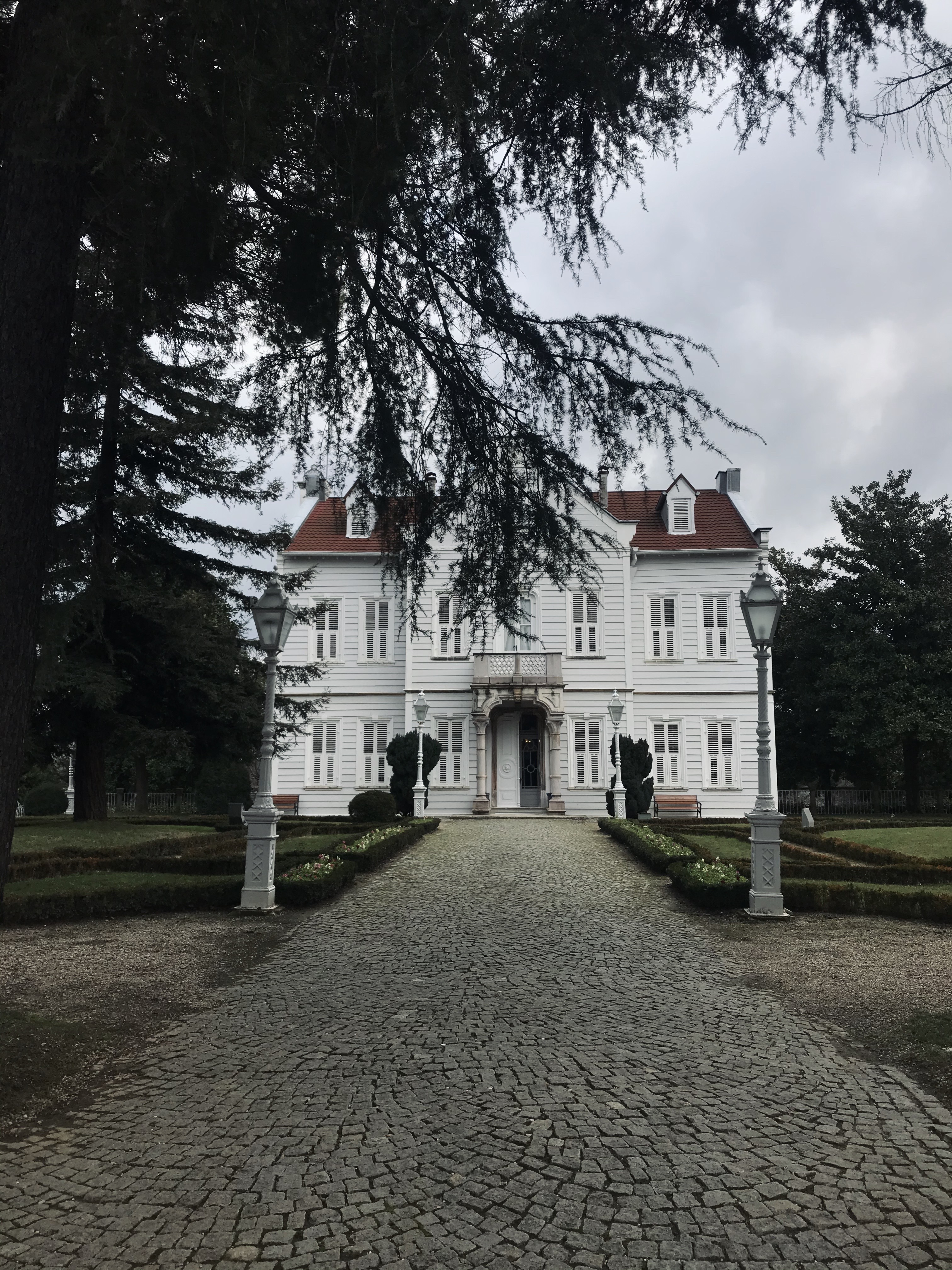 Maslak Kasrı